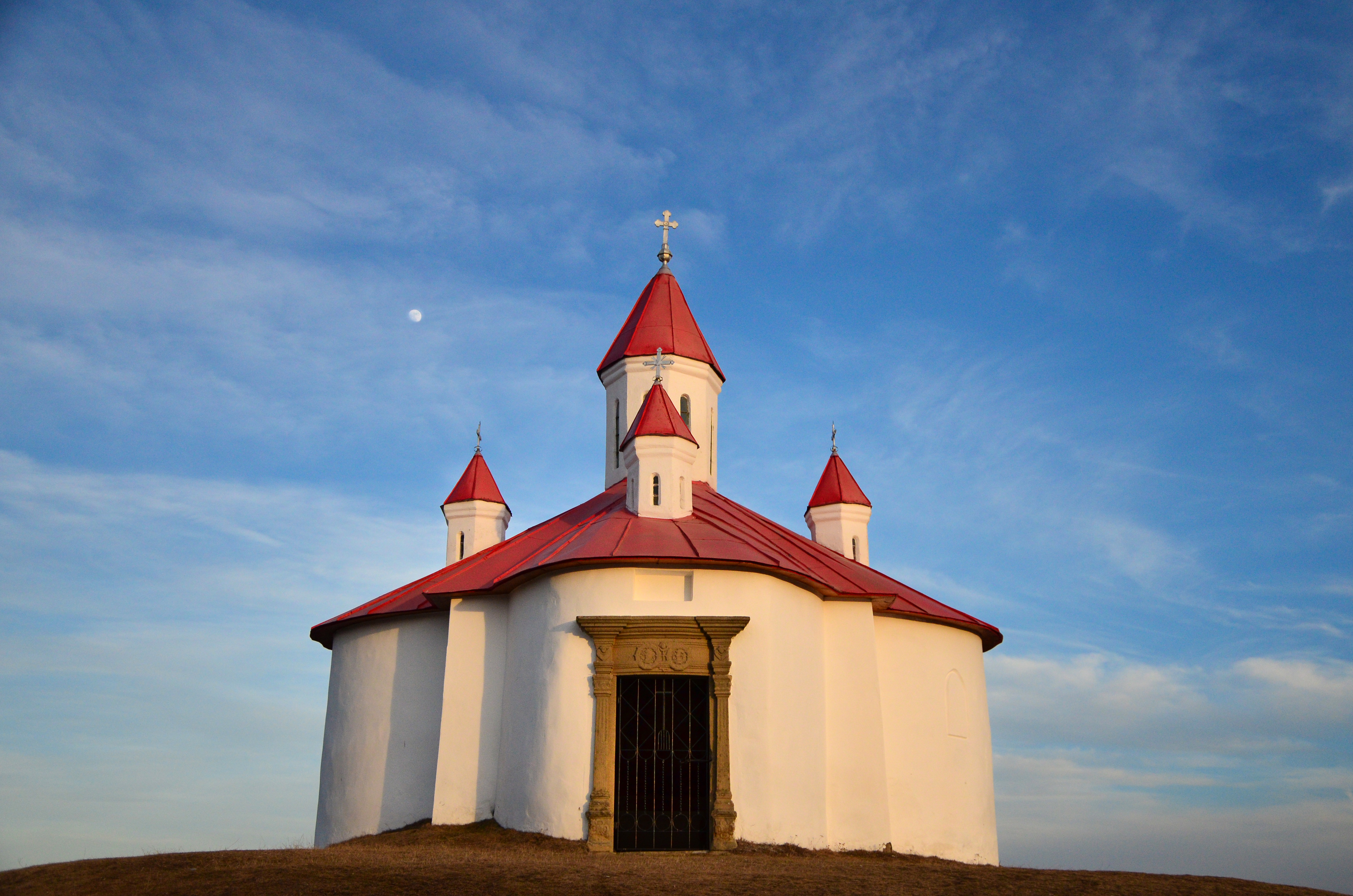 Capela romano-catolică „Sf. Ștefan” - sat Sânzieni; comuna Sânzieni 01